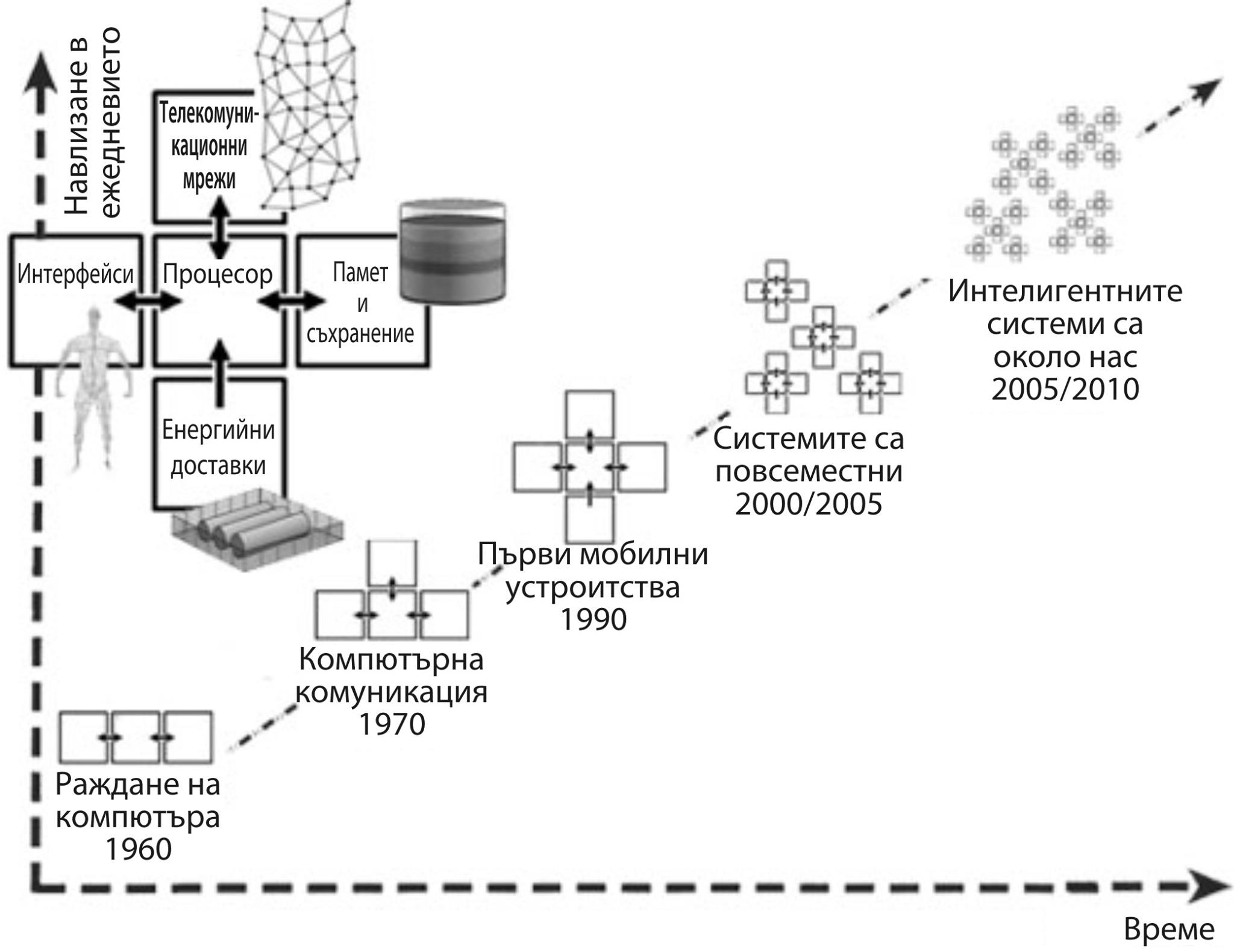 Очаквания за развитието на компютърните системи 1960-2010